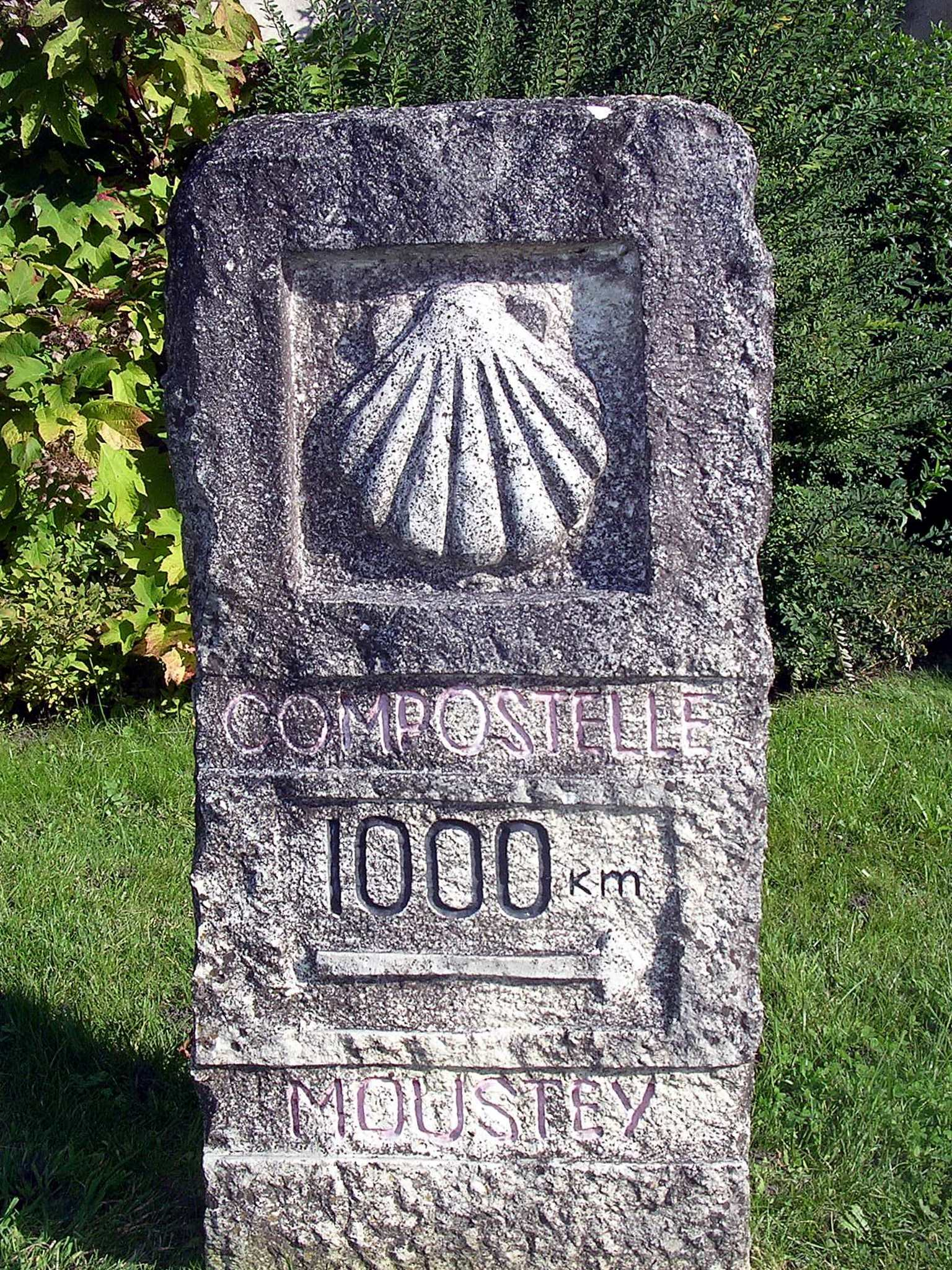 Borne des 1000 km de Saint-Jacques-de-Compostelle, sur la commune de Moustey, dans le département français des Landes